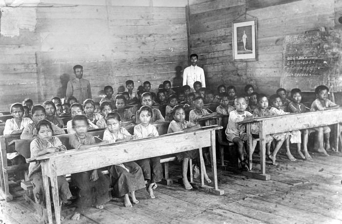 Repronegatief. Leerlingen van een zendingsvolksschool van de Rijnsche Zending op Nias